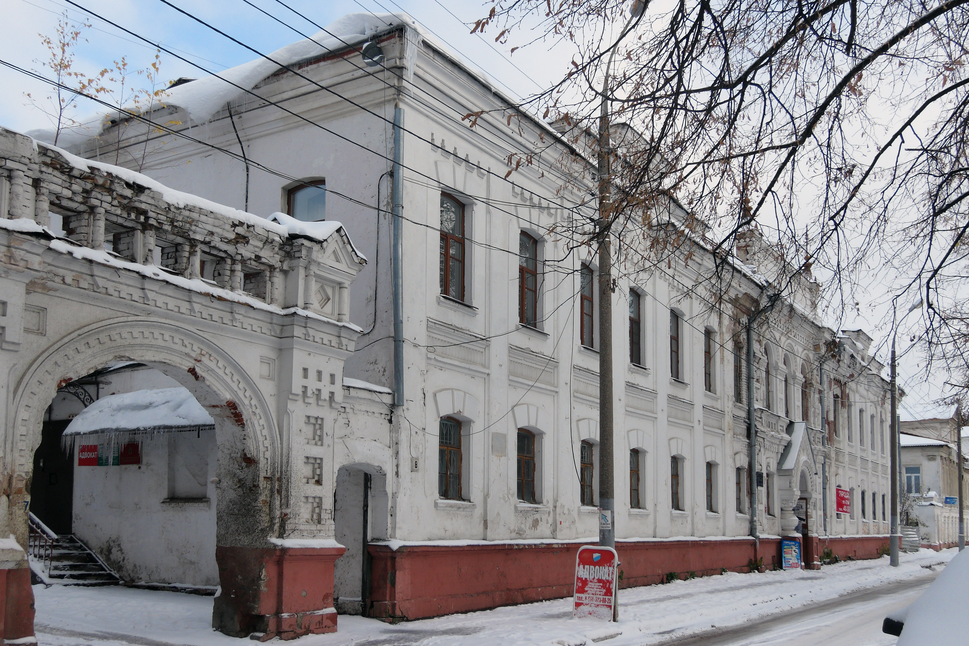 Богадельня Вахрамеева (Ярославская область, Ярославль, Красный Съезд, 8)